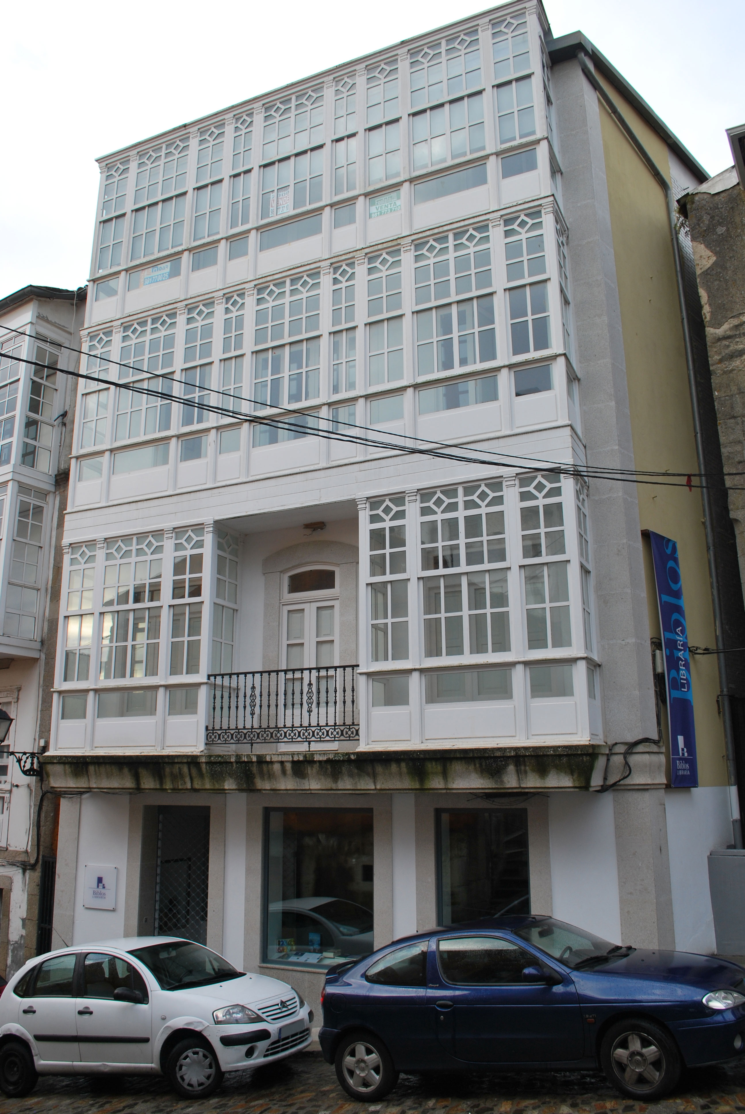 Libraría de Biblos en Betanzos